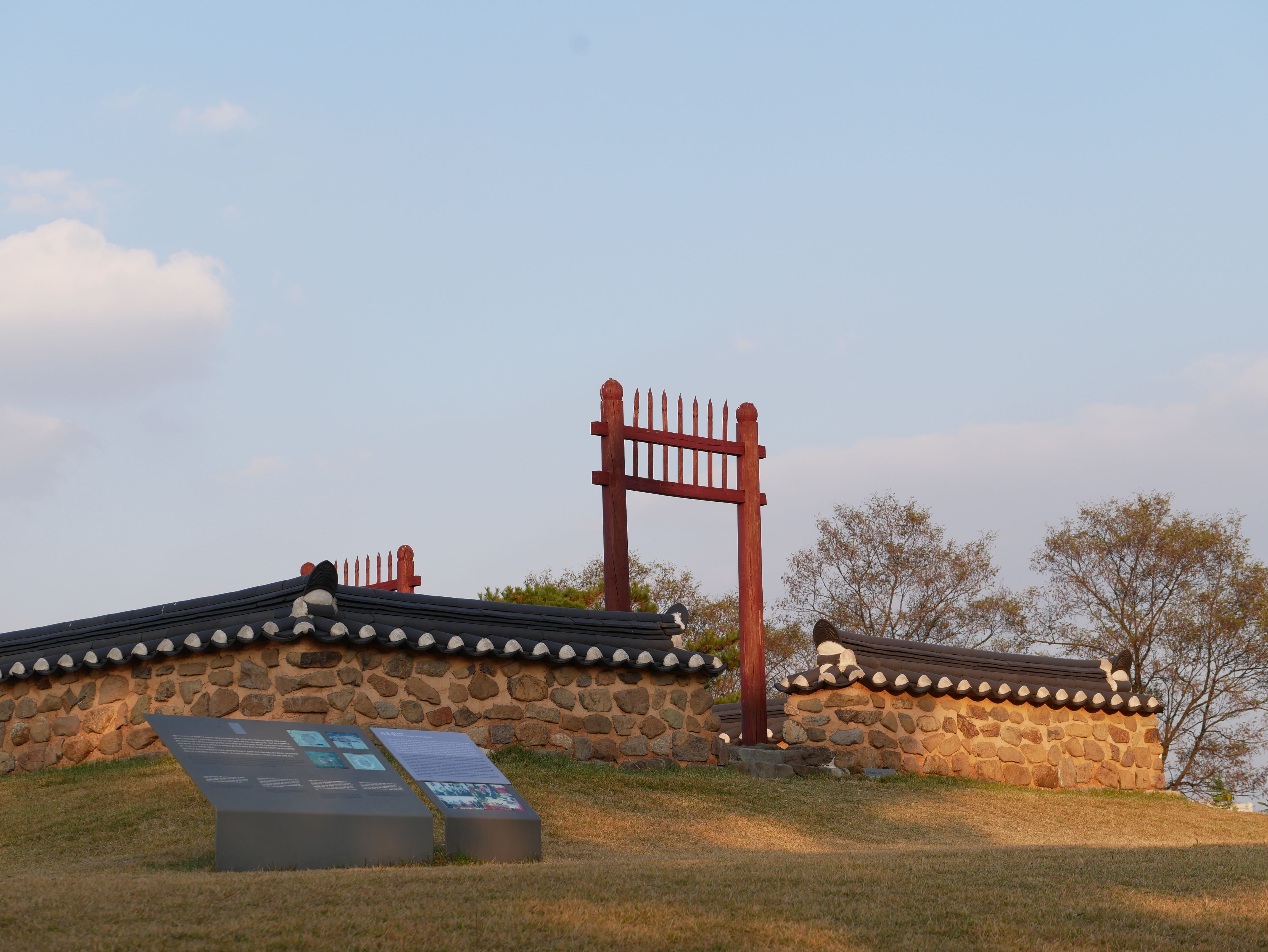 노변동 사직단 전경, 11월 4일 촬영